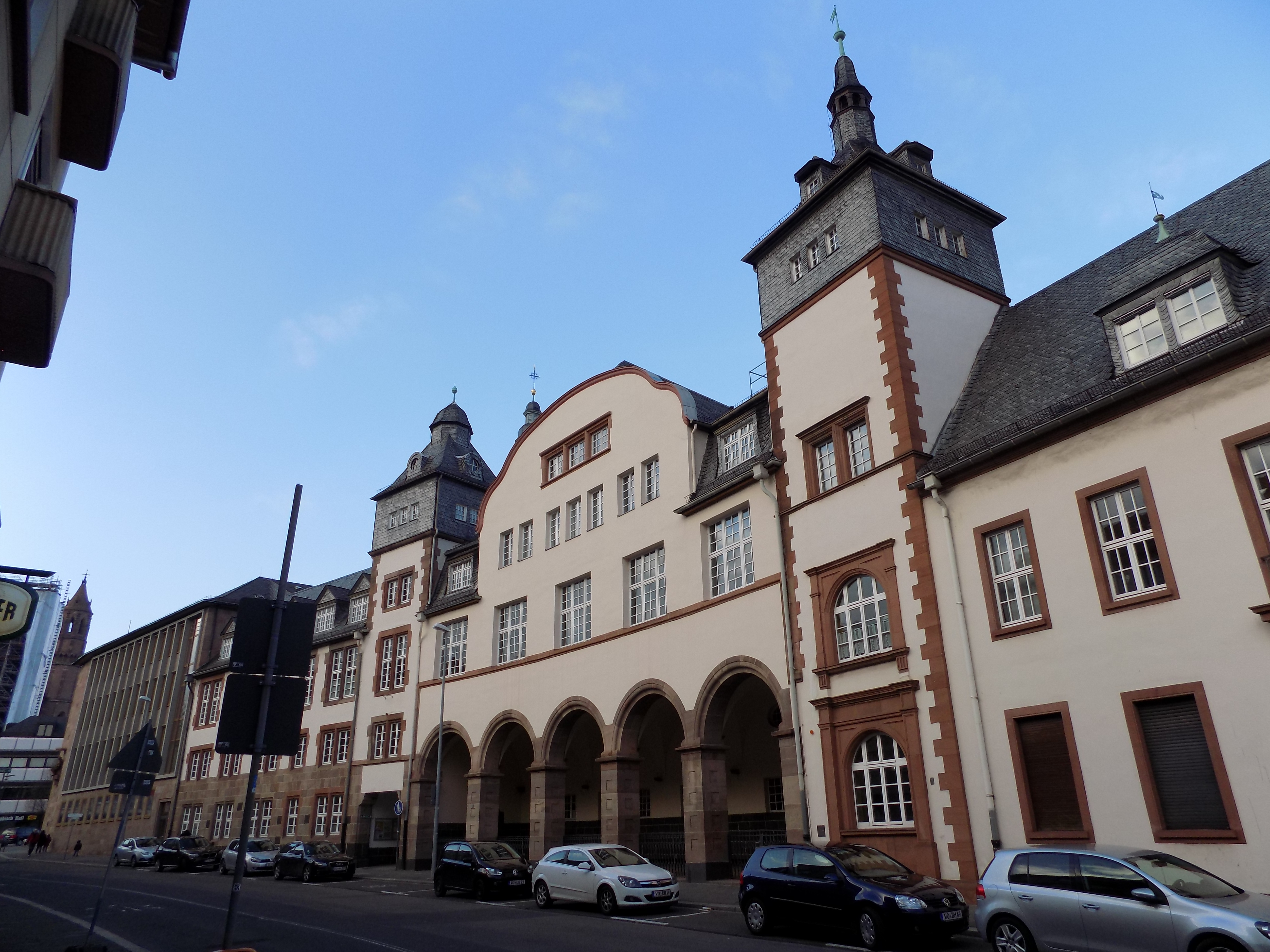 Worms- altes Rathaus